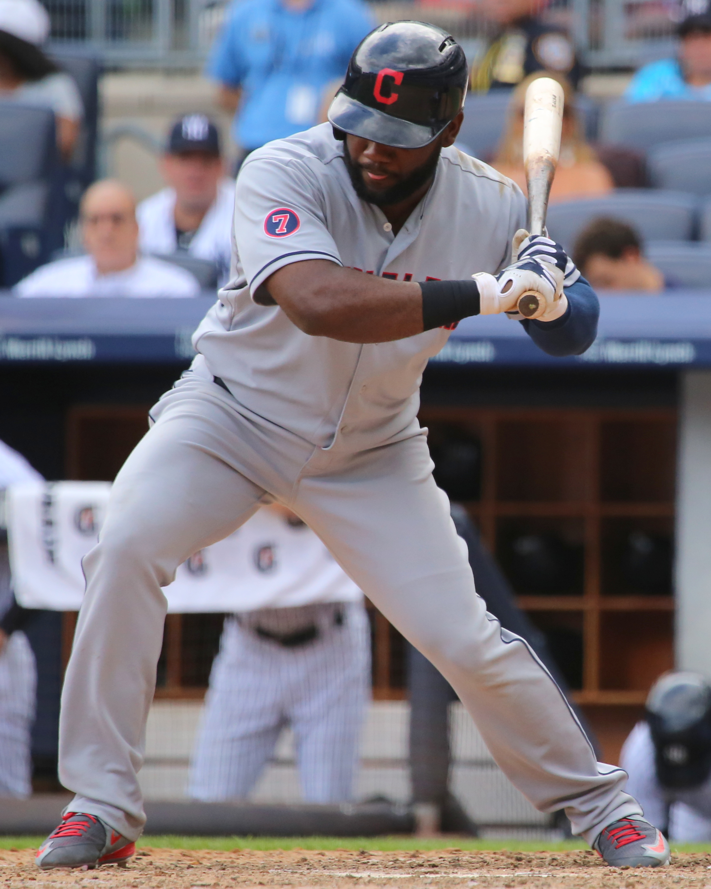 Abraham Almonte